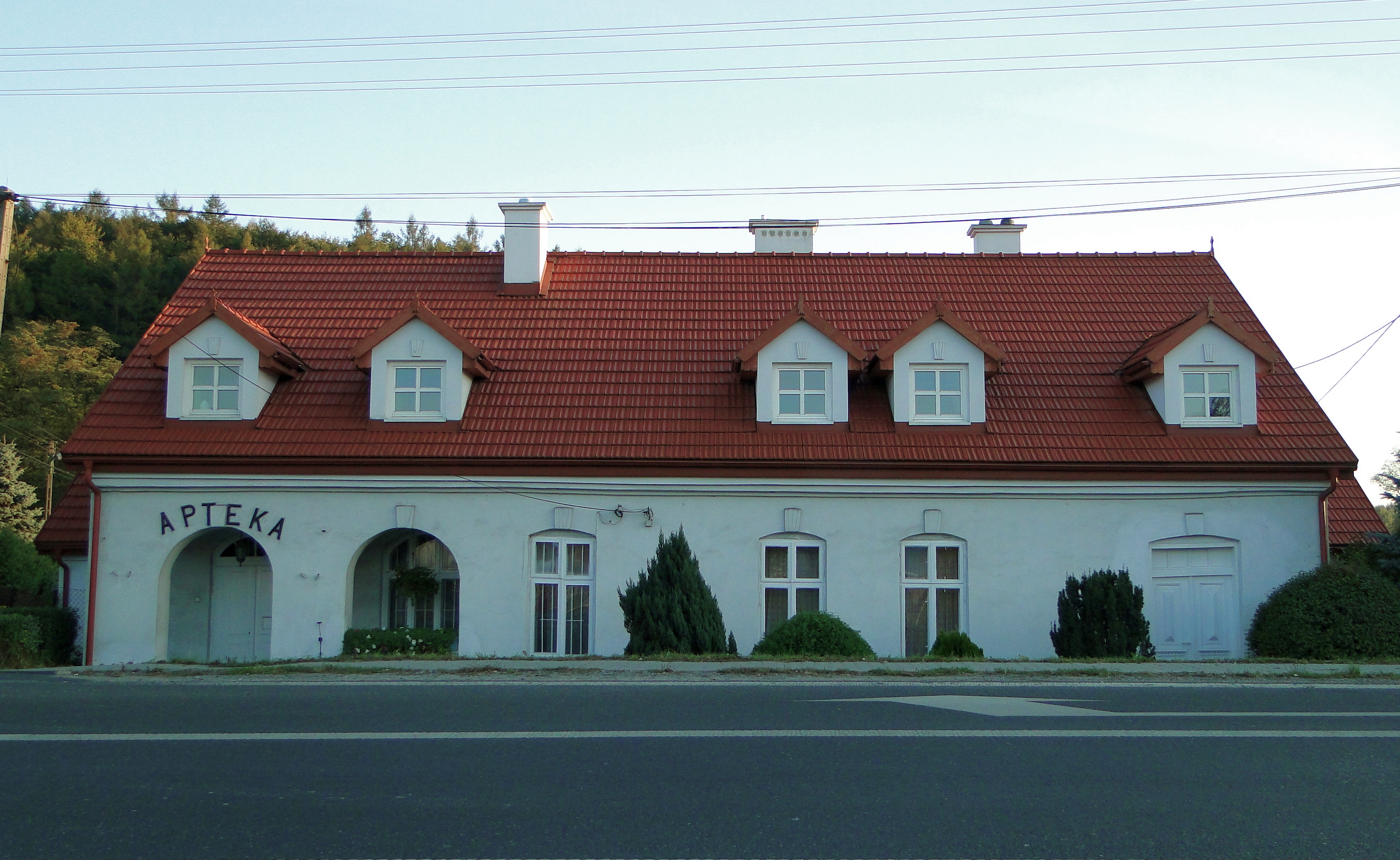 Zabytkowa apteka w Zerwanej